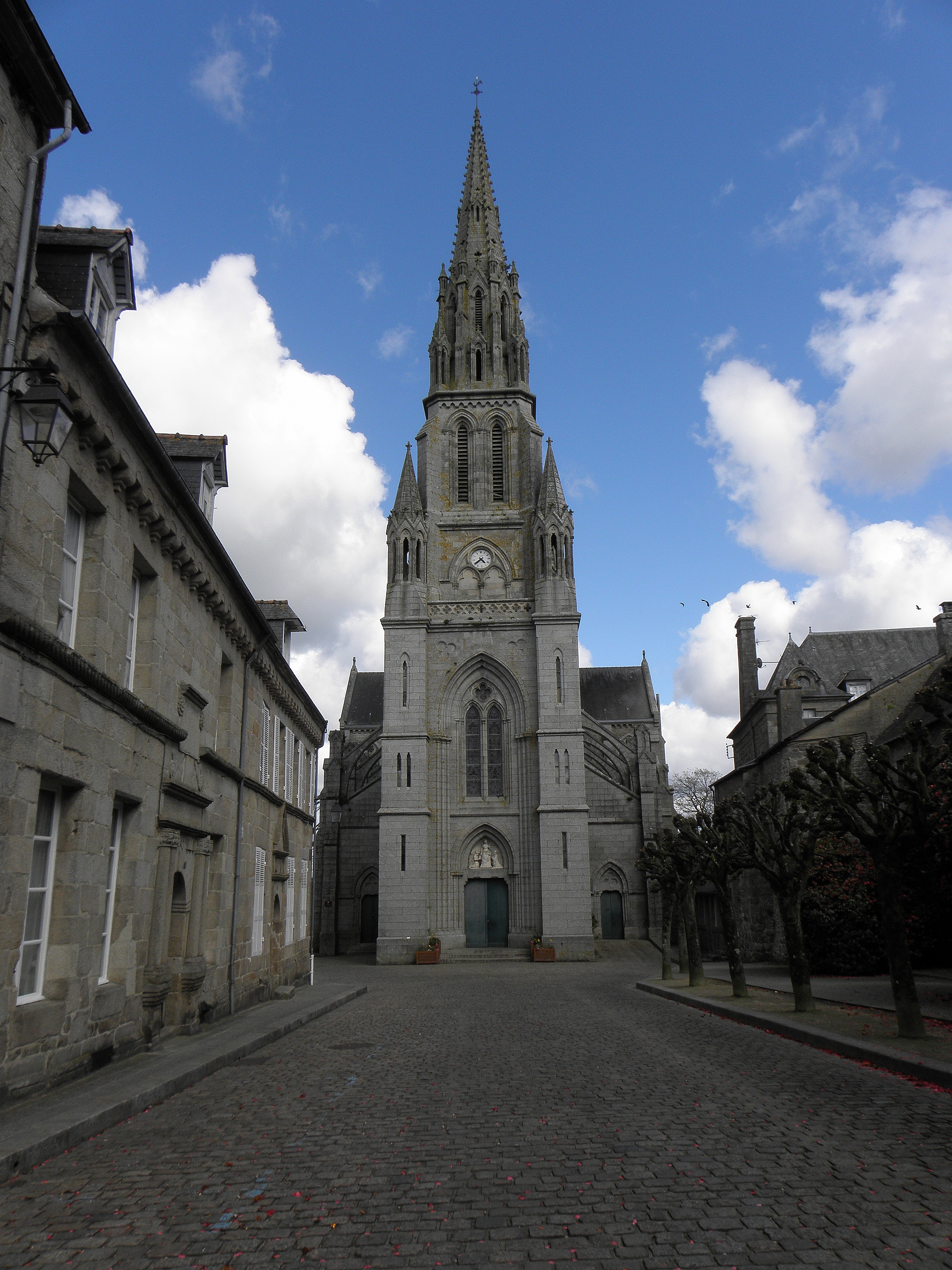 Façade occidentale de la basilique N.D. de Délivrance de Quintin (22).